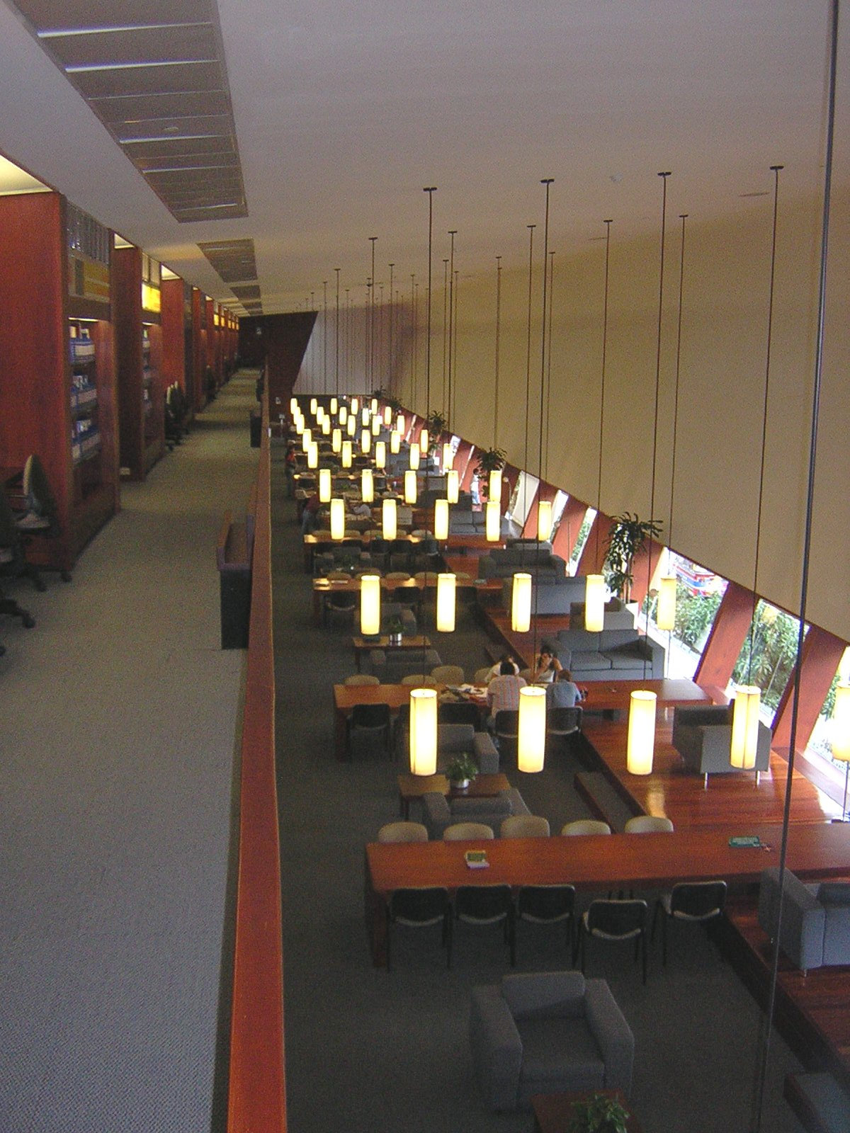 Biblioteca EPM, Medellín, Colombia